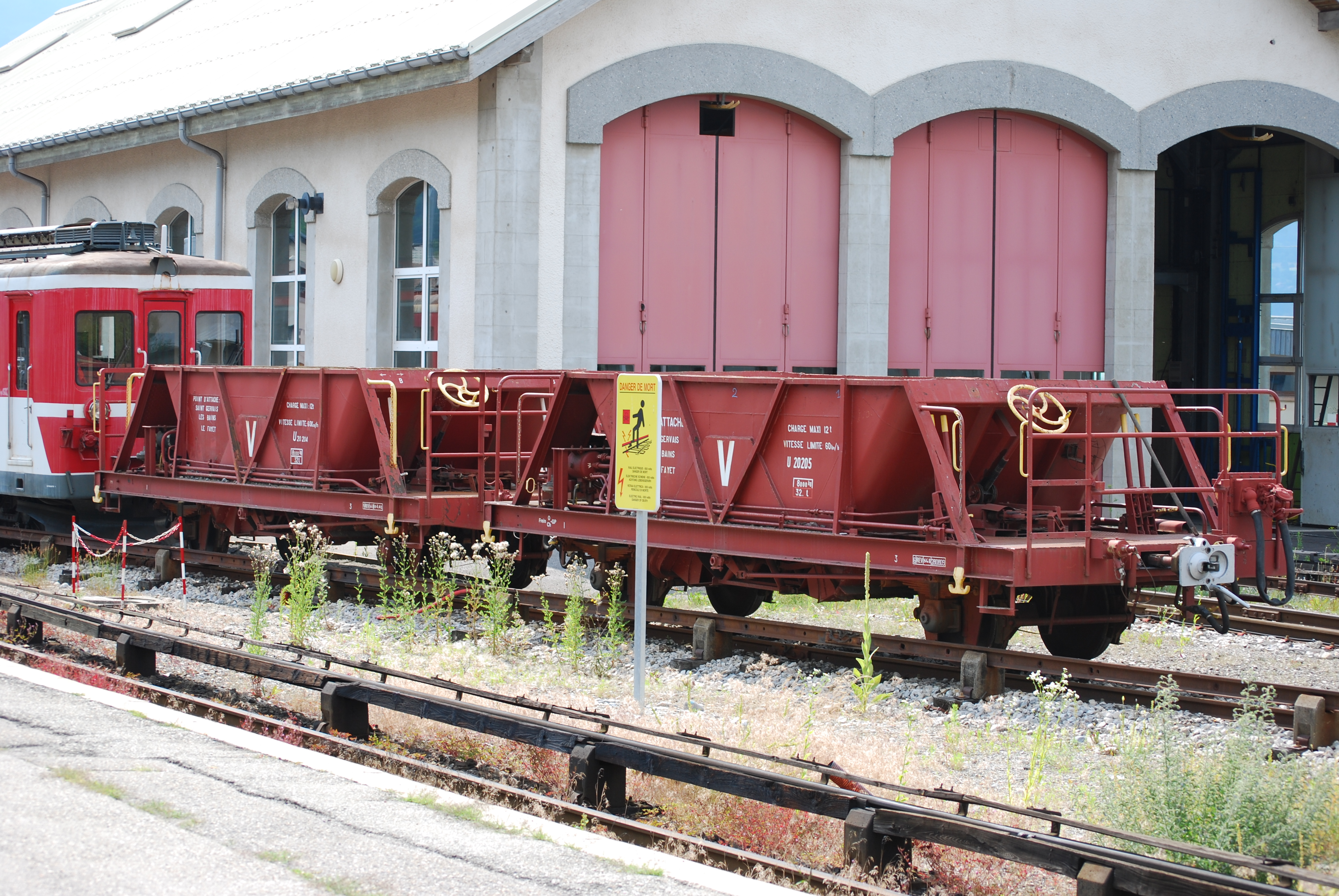 Wagons à ballast voie métrique en gare du Fayet.